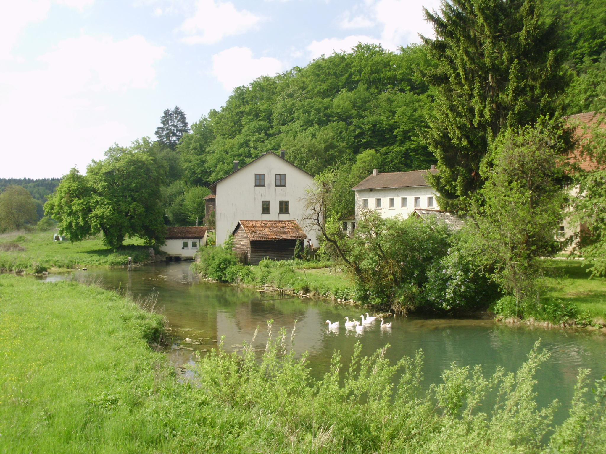 Sägmühle, Ortsteil von Treuchtlingen im Landkreis Weißenburg-Gunzenhausen (Bayern)